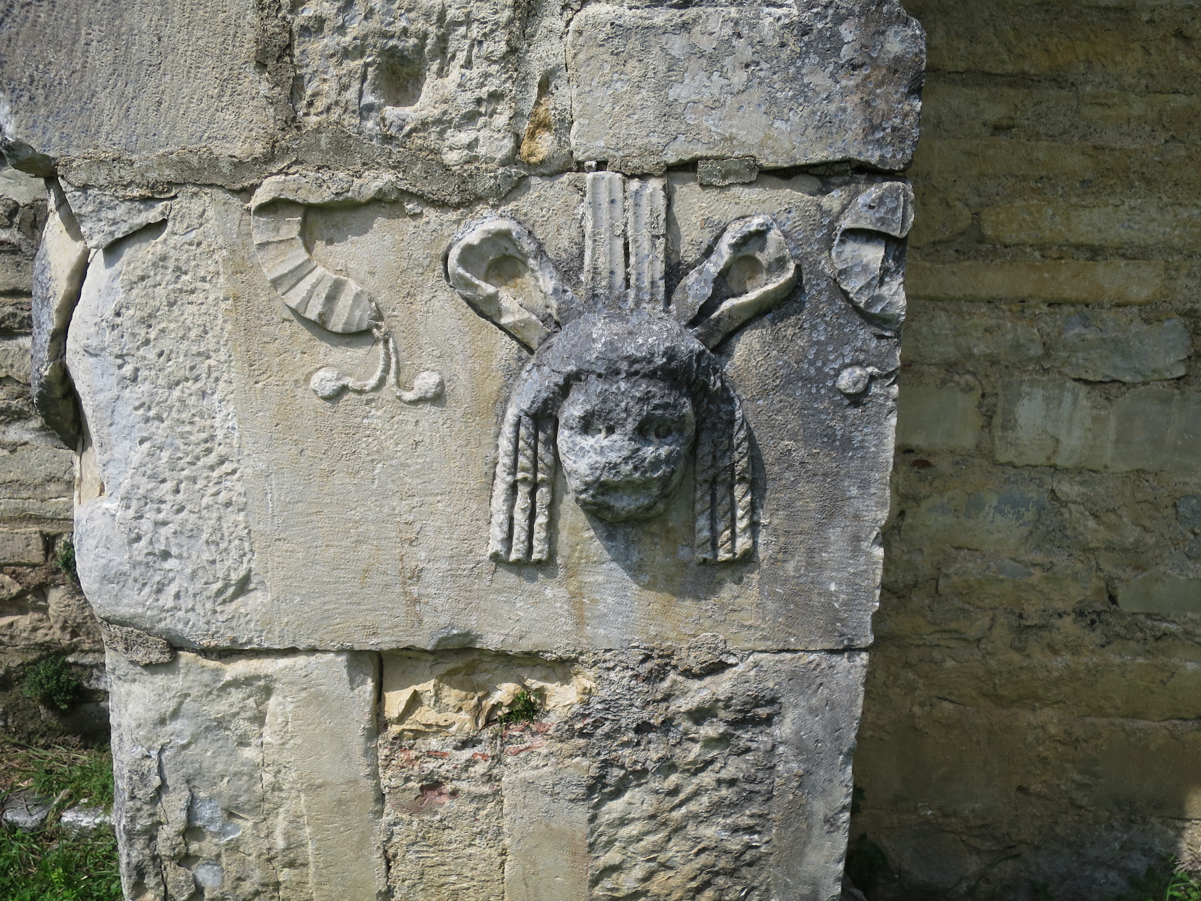 Römische Spolie (Theatermaske) an der Südseite der Kirche Saint-Just de Valcabrère